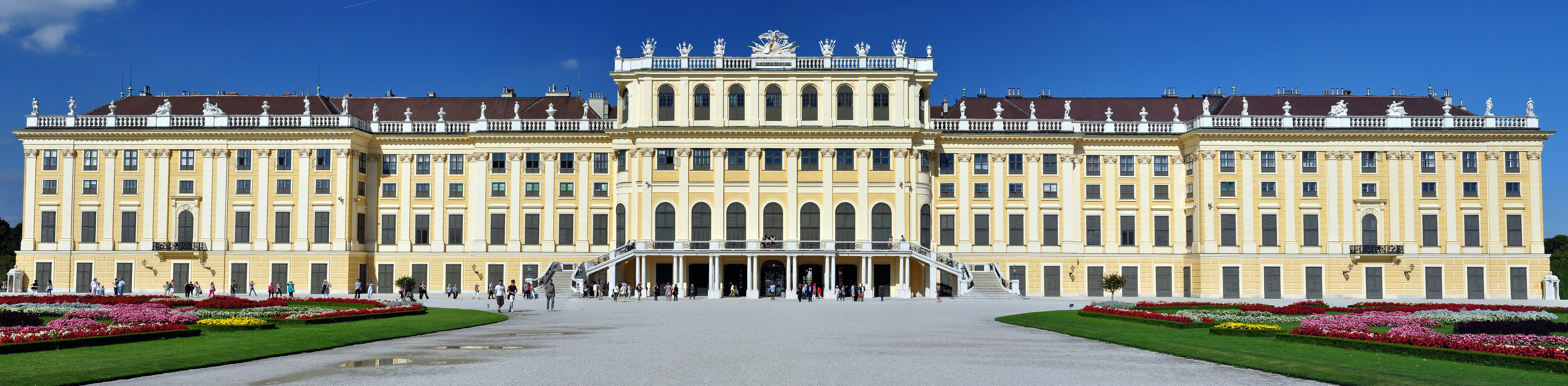 Schönbrunn, Viedeň, Rakúsko